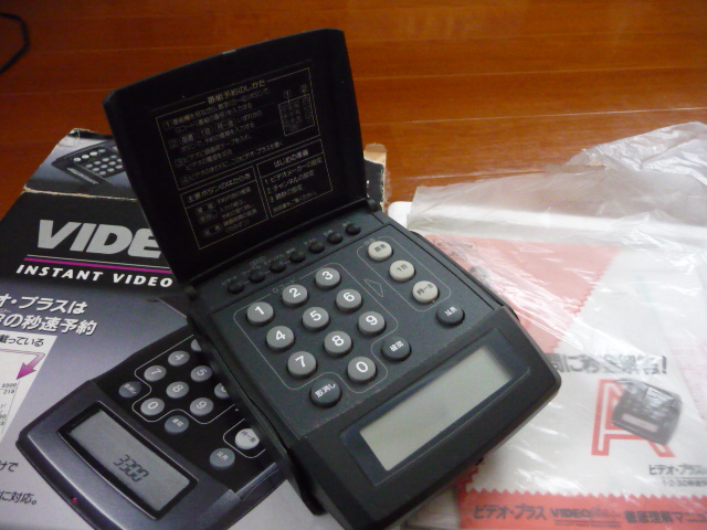 ビデオ・プラス（Ｇコード予約機）